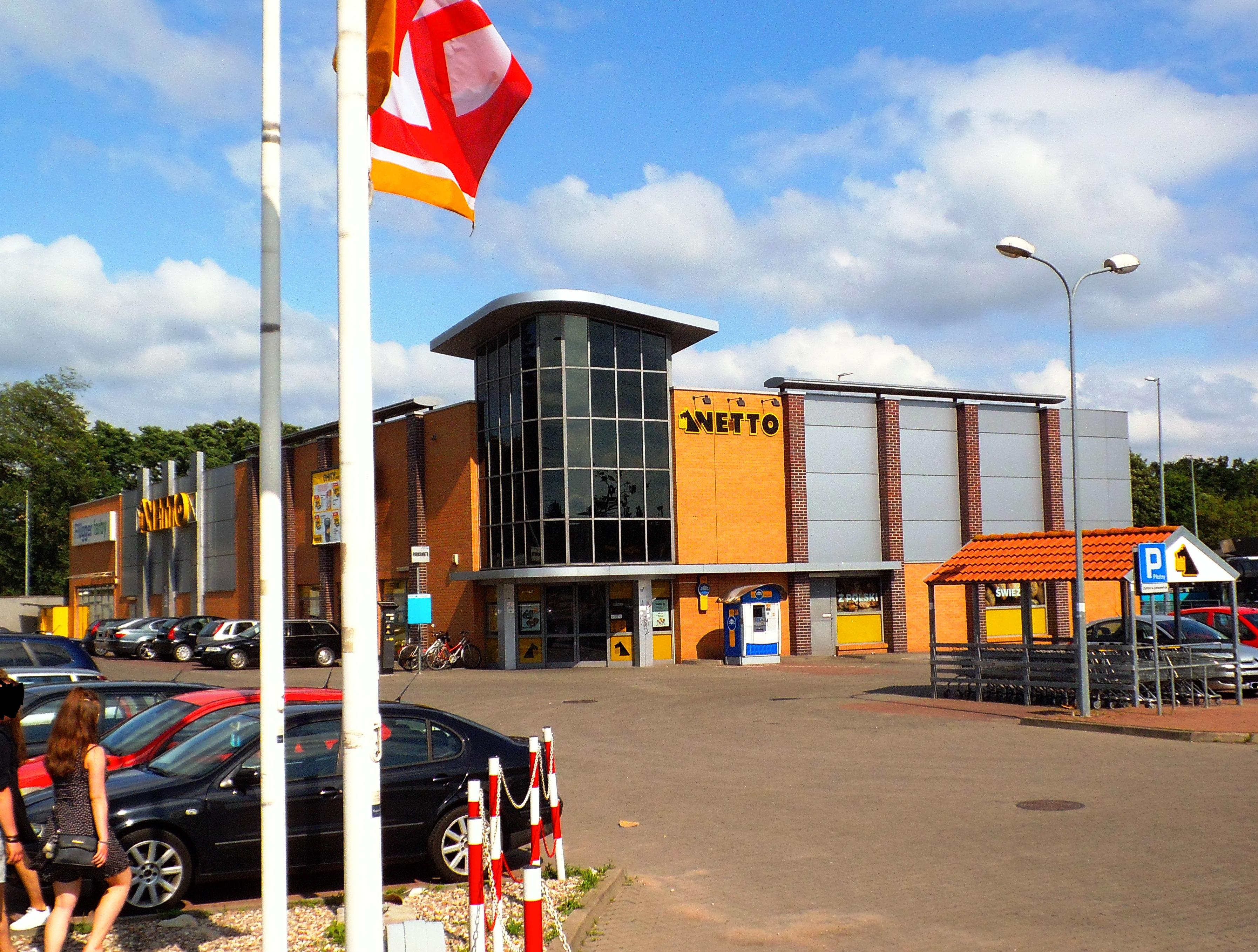 Sklep Netto w Toruniu